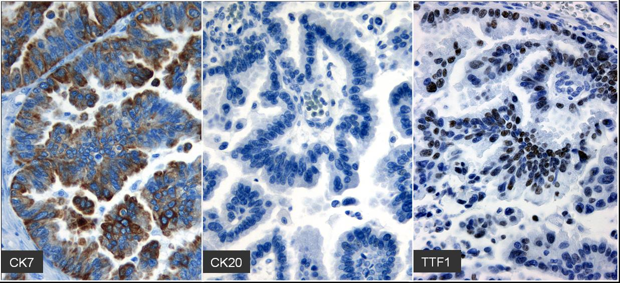 Immunhistochemisches Expressionsprofil einer Hirnmetastase bei unbekanntem Primärtumor. Die Tumorzellen exprimieren den Zytokeratinsubtyp CK7 (braun), nicht aber CK20; die Kerne der Tumorzellen färben sich in der TTF1-Färbung deutlich an. Der immunhistochemische Befund spricht somit am ehesten für eine Hirnmetatase eines Bronchialkarzinoms.